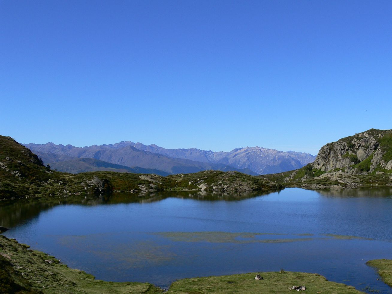 Etang d'Appy (massif de Tabe, Ariège, France) . Au fond, les pyrénées ariégeoises et andorranes (Pic de Tristagne, massif du Montcalm, massif de Bassiès).